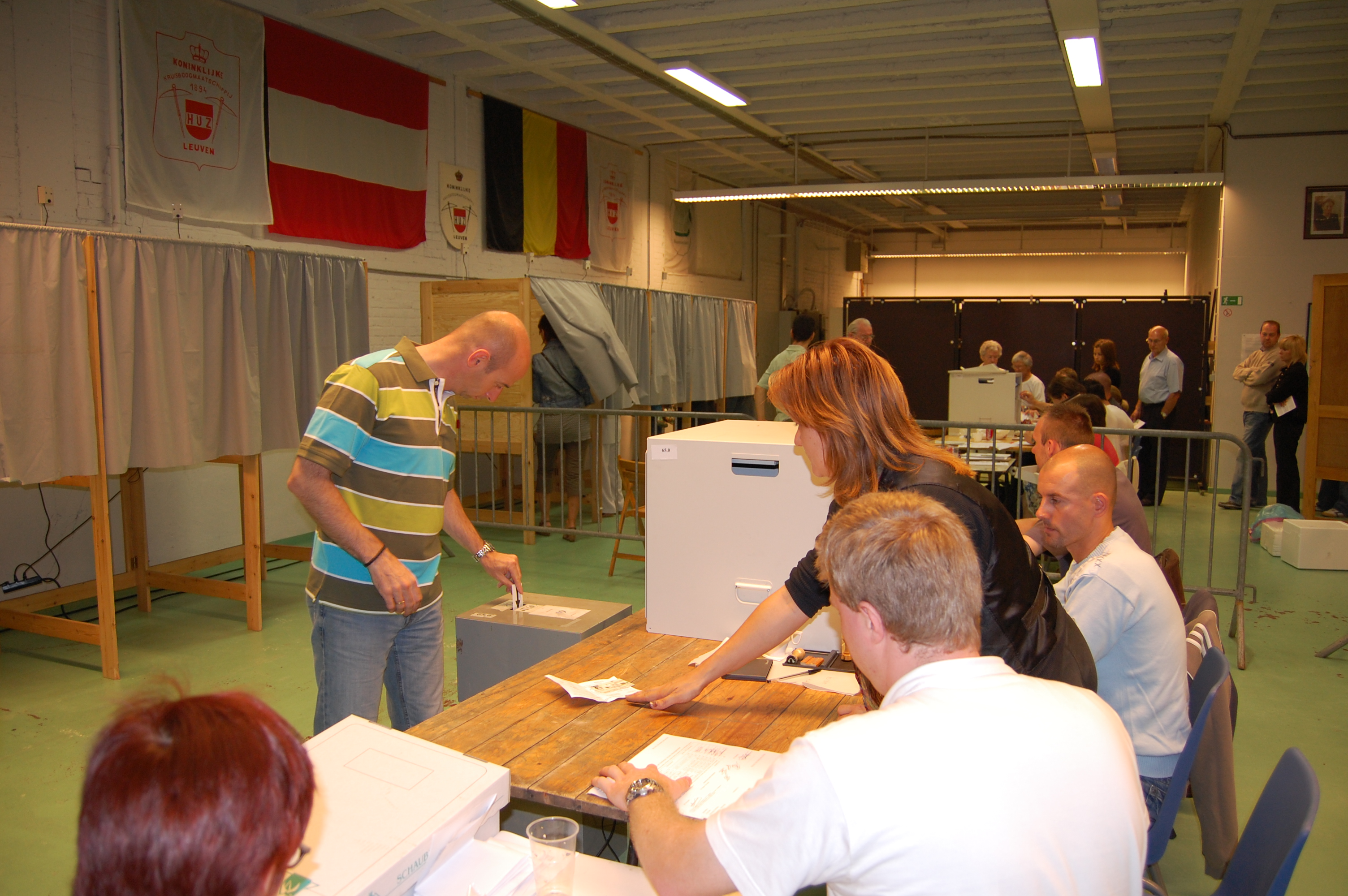 2007 federal elections in Belgium. Picture take in election bureau 65 in Wilsele, Leuven, Vlaams-Brabant, Belgium.